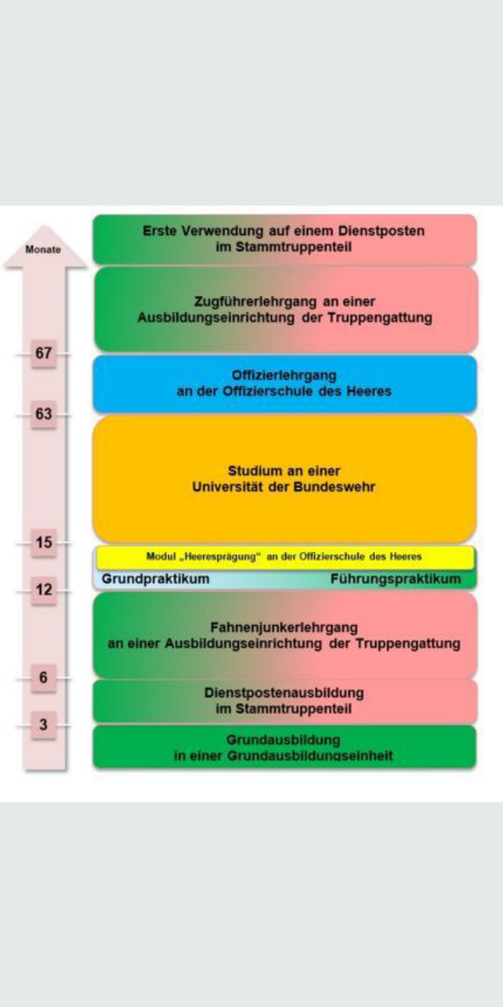 Schema der neuen Offizierlaufbahn